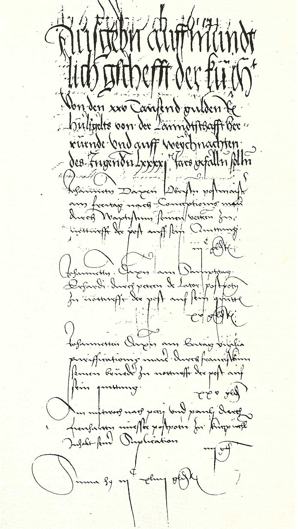 Postalische Eintragung in den Innsbrucker Kammerraitbüchern 1490, Nennung von Janetto (Johannetten Daxen, Obrister Postmeister), seinem Neffen Johann Baptista von Taxis (Waptista), und Janettos Bruder Franz von Taxis (Franciskem)